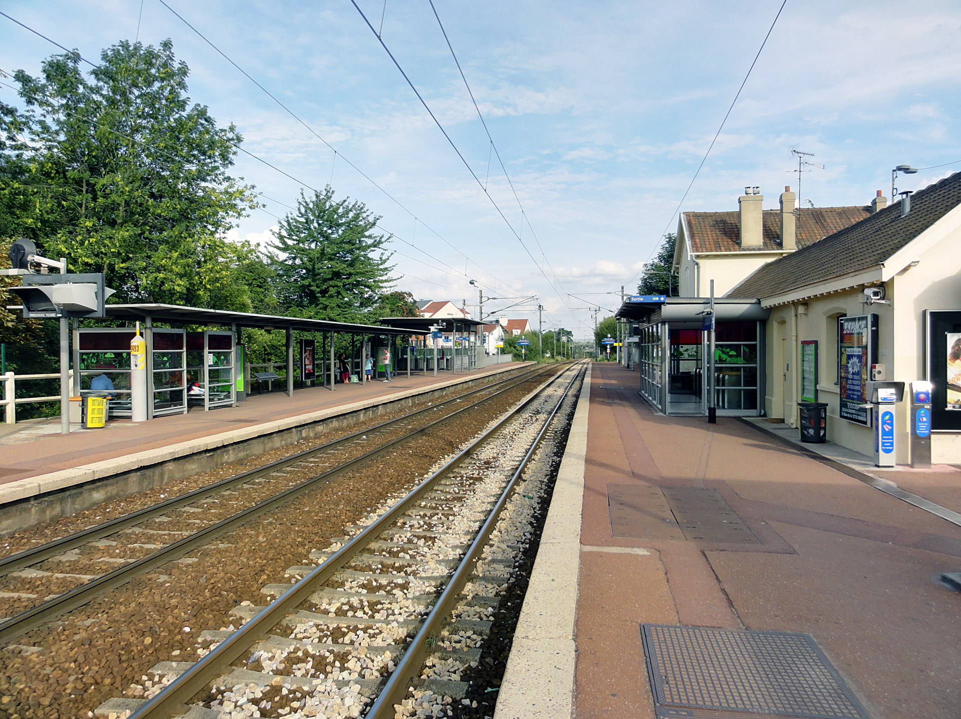 La gare de Domont, Val-d'Oise, France.